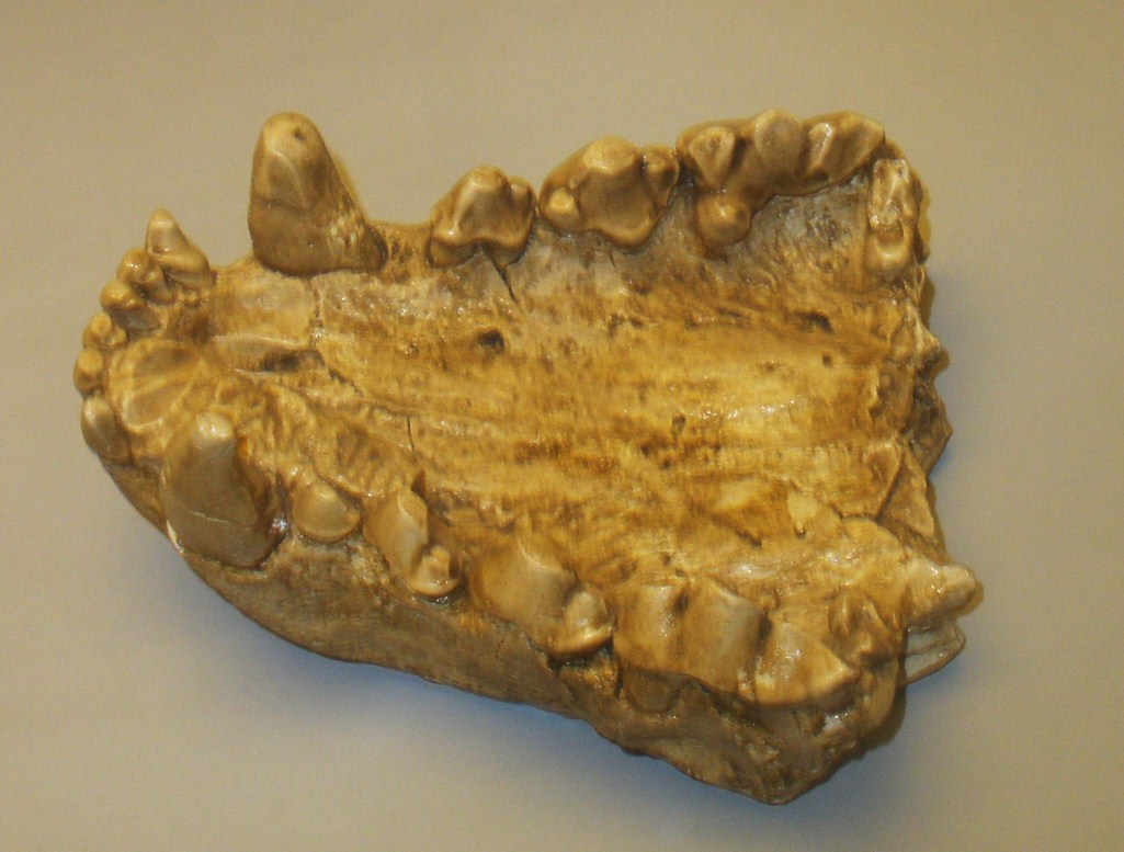 Fossil of Chasmaporthetes, an extinct mammal - Took the picture at Museo di Paleontologia di Firenze